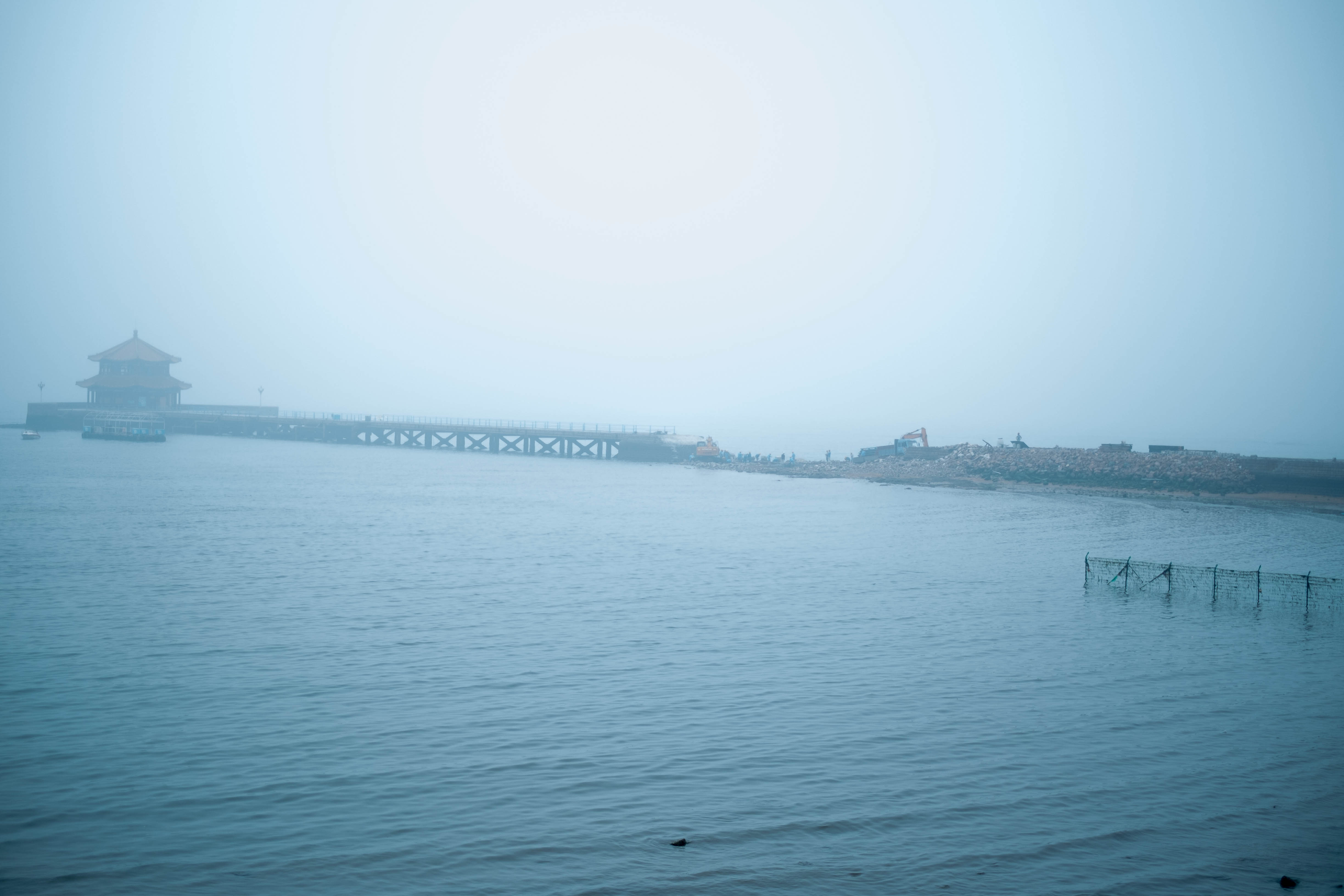 被冲毁后修复中的栈桥